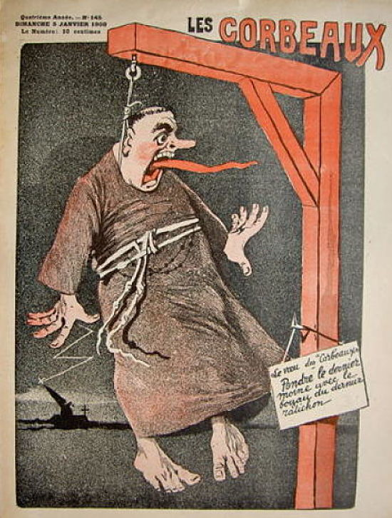 Les Corbeaux (1904-1909) est une revue satirique anticléricale fondée par Didier Dubucq.